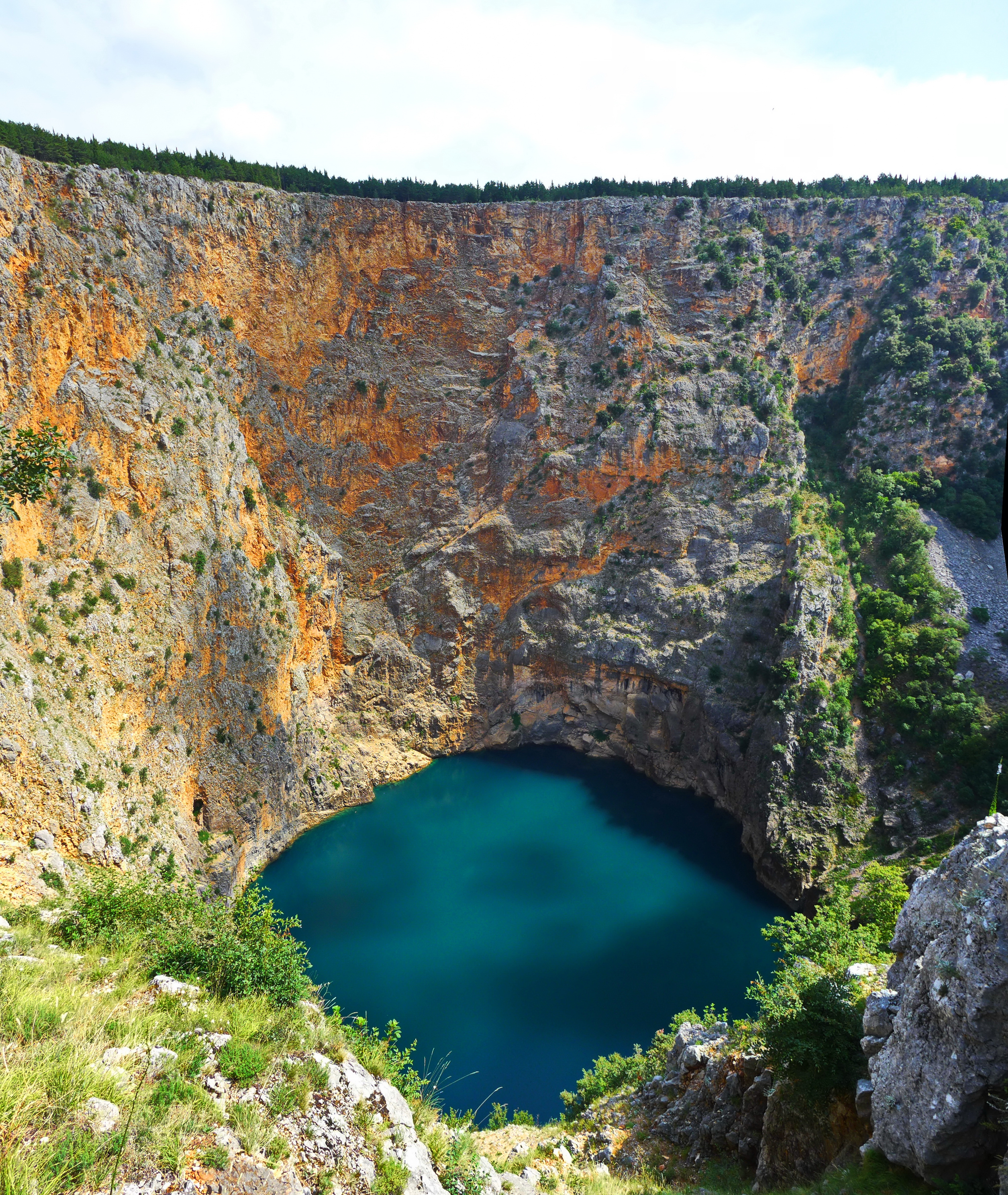 Imotski, Roter SeeHrvatski: Imotski, Crveno Jezero